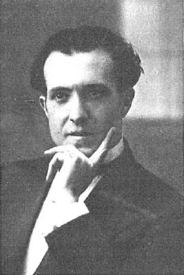 Fotografía del actor español Rafael Rivelles publicada en 1926 con motivo de su actuación en el Teatro Barcelona.